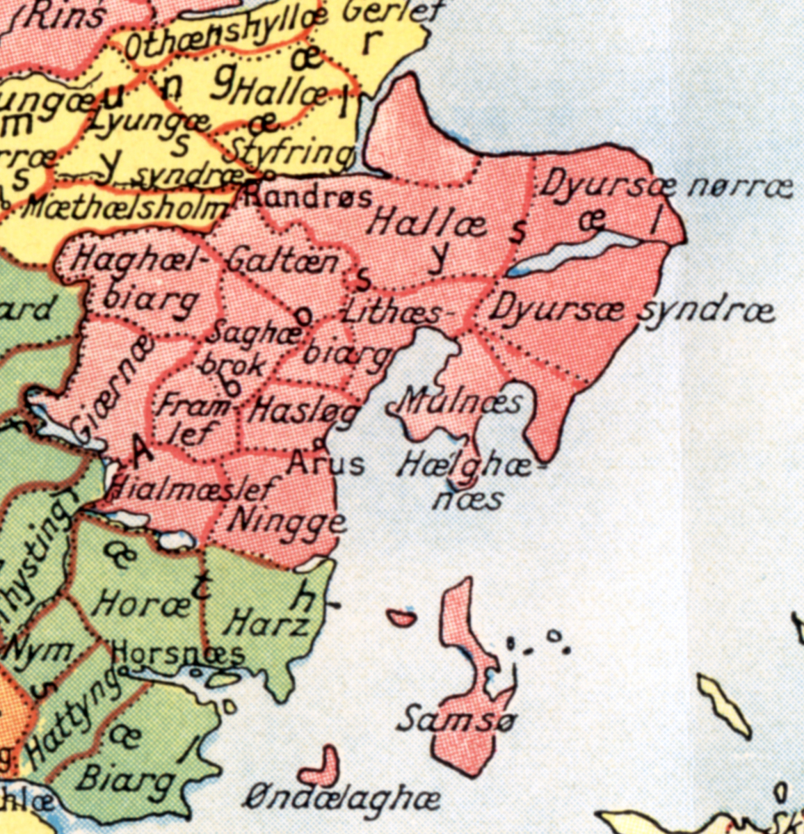 Åbosyssel of denmark in medieval times